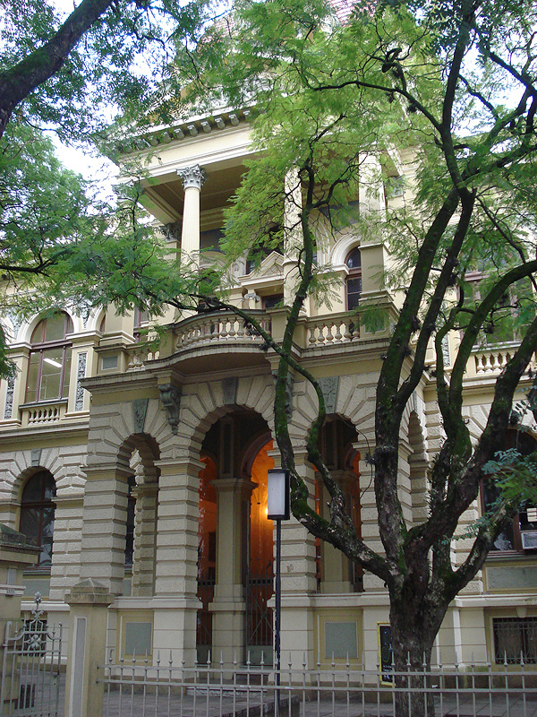 Detalhe da fachada da Faculdade de Direito, um prédio histórico da Universidade Federal do Rio Grande do Sul, Porto Alegre, Brasil.